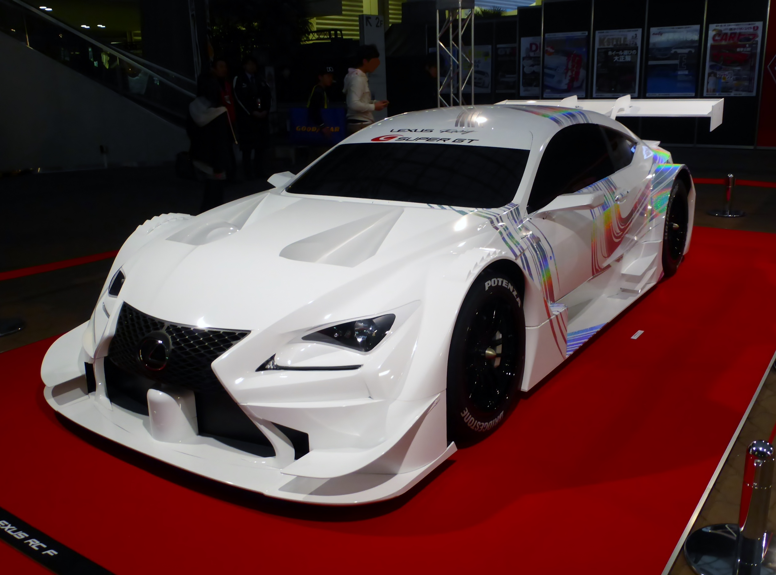 大阪オートメッセ2014に展示されたレクサス・RC FのGT500車両を撮影。